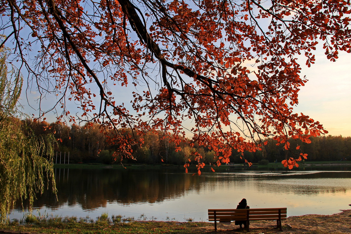 Парк "Сокольники", Восточный округ This image is related to the protected area of Russia number 7710274